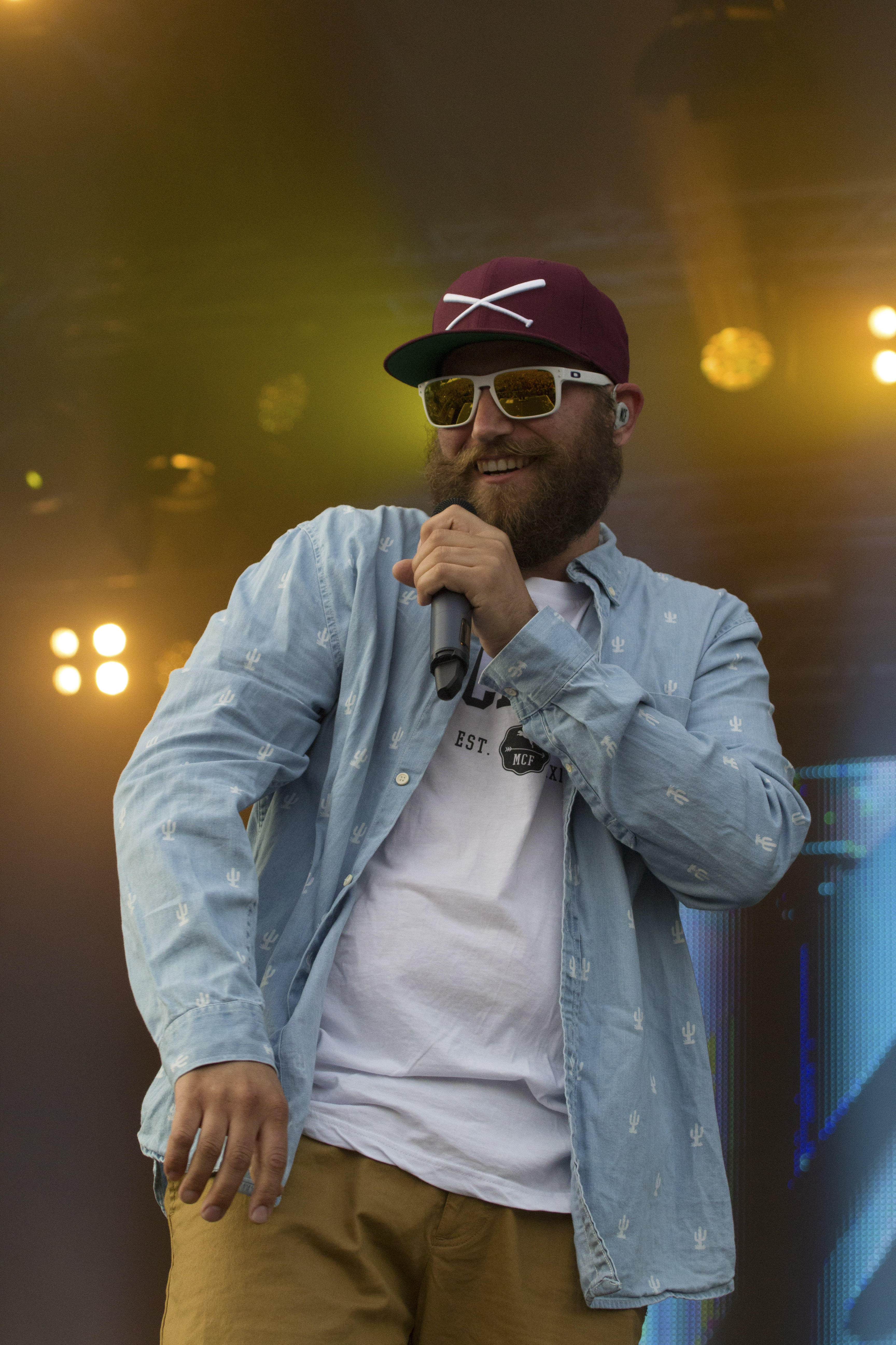 MC Fitti (2015)